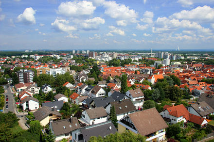 Blick vom Wingertsberg